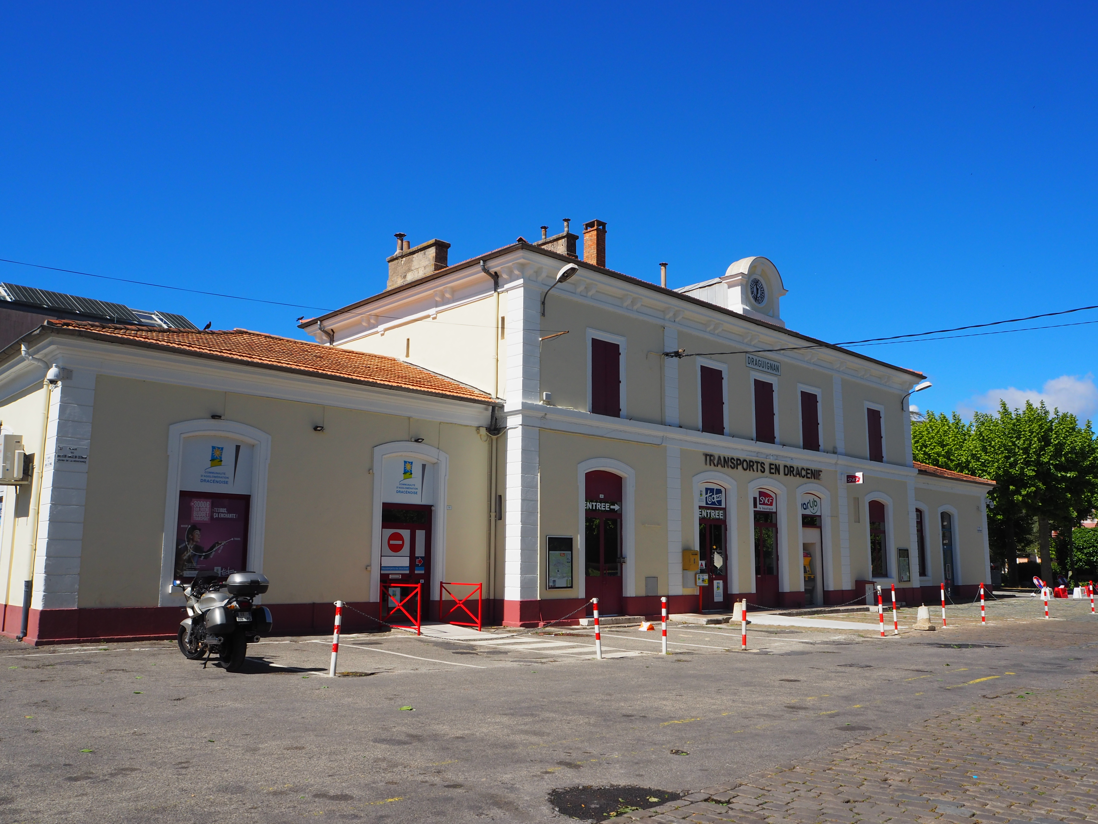 Ancienne gare ferroviaire de Draguignan (PLM SNCF)